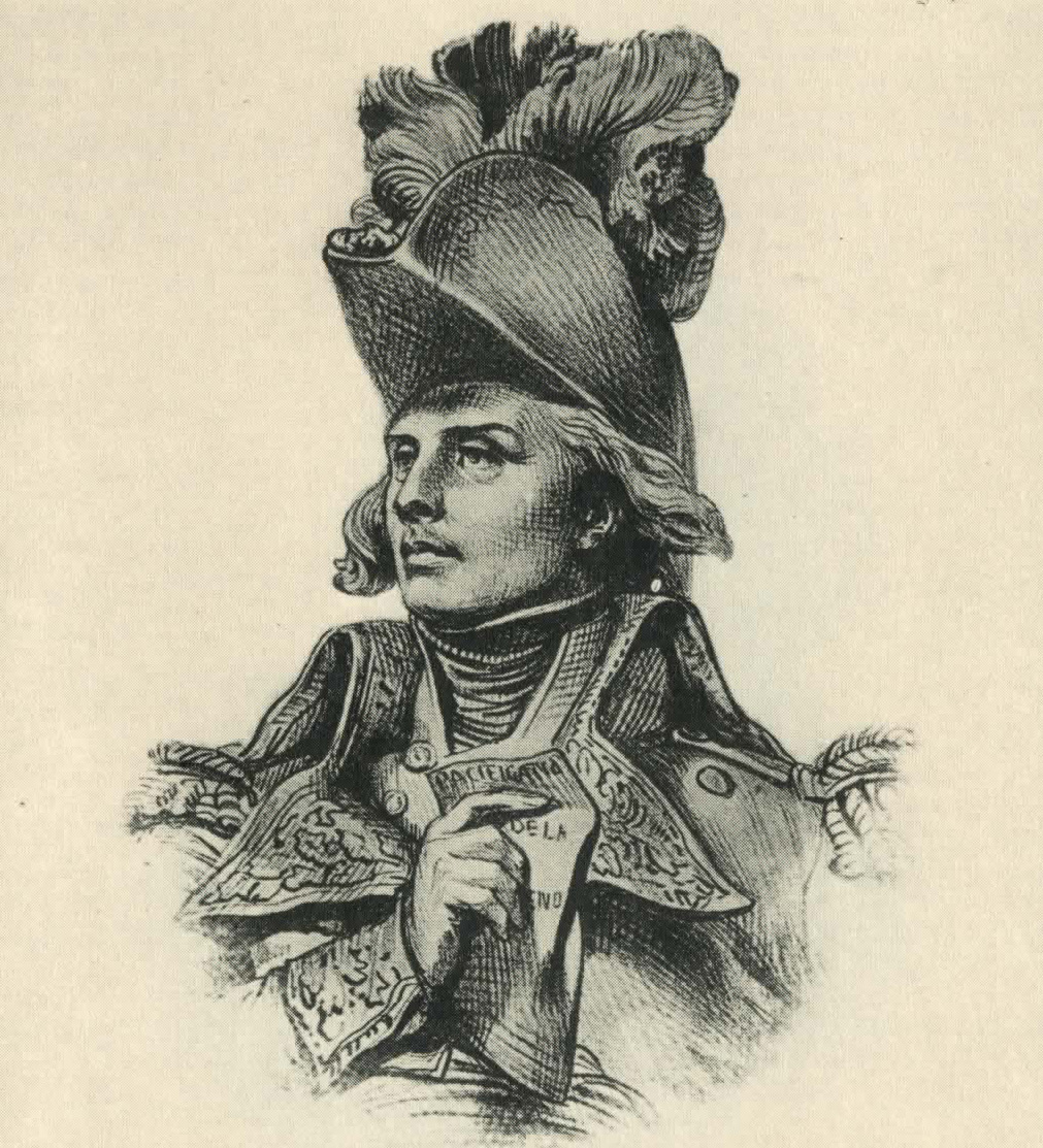 Jean-Pierre Travot (1761-1836)